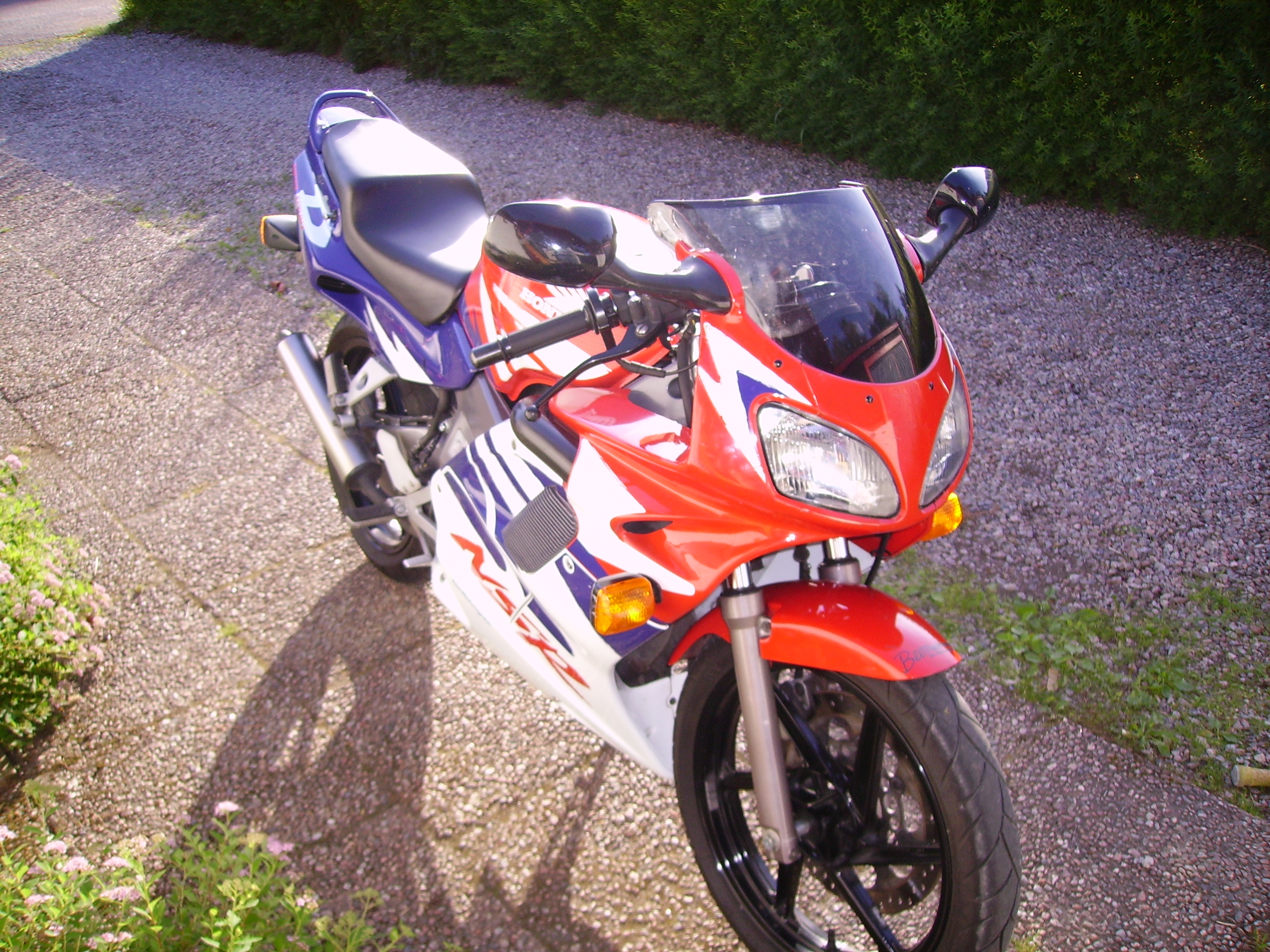 Honda NSR 125R -98